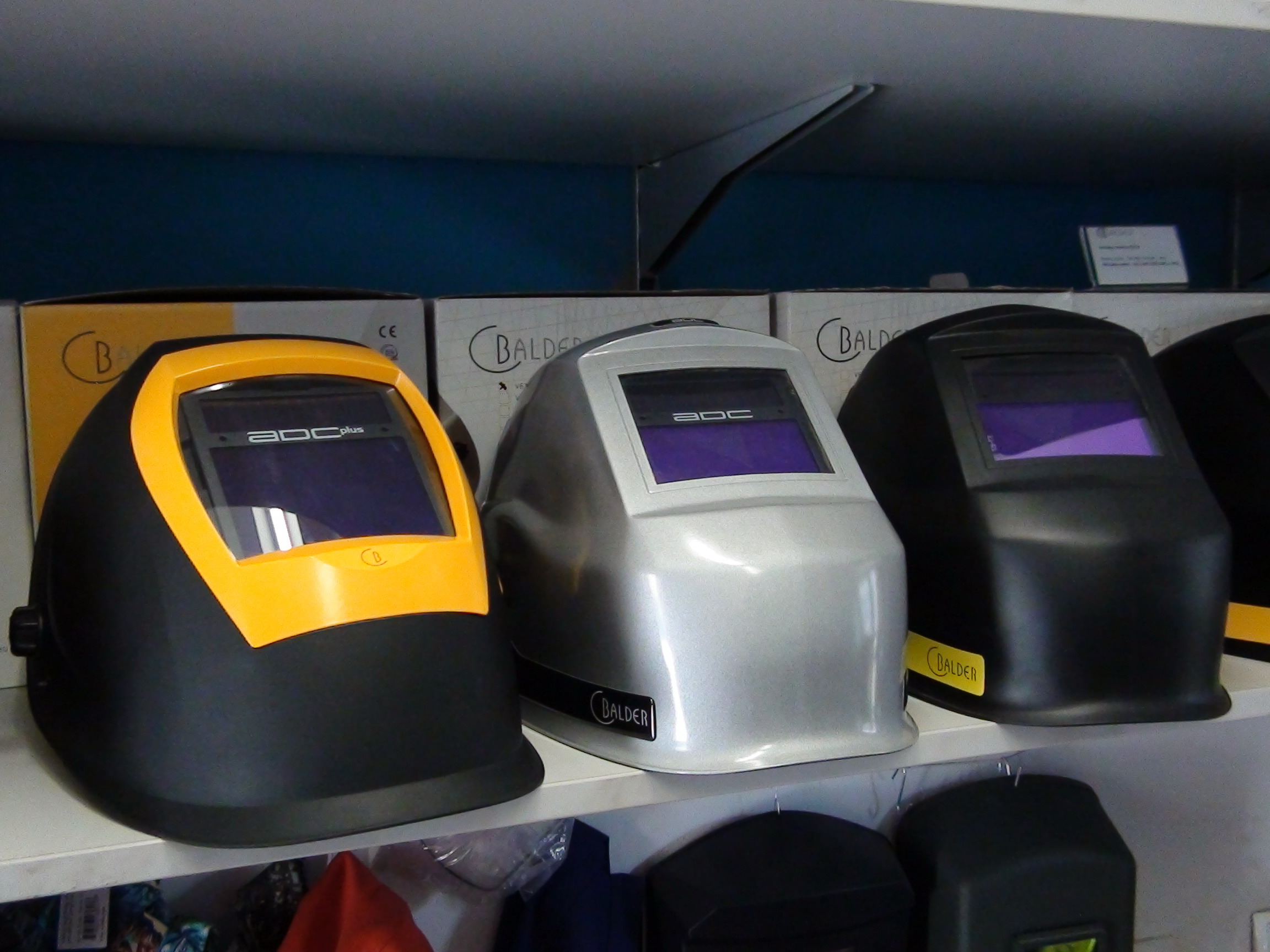 Zaščitne varilske maske.